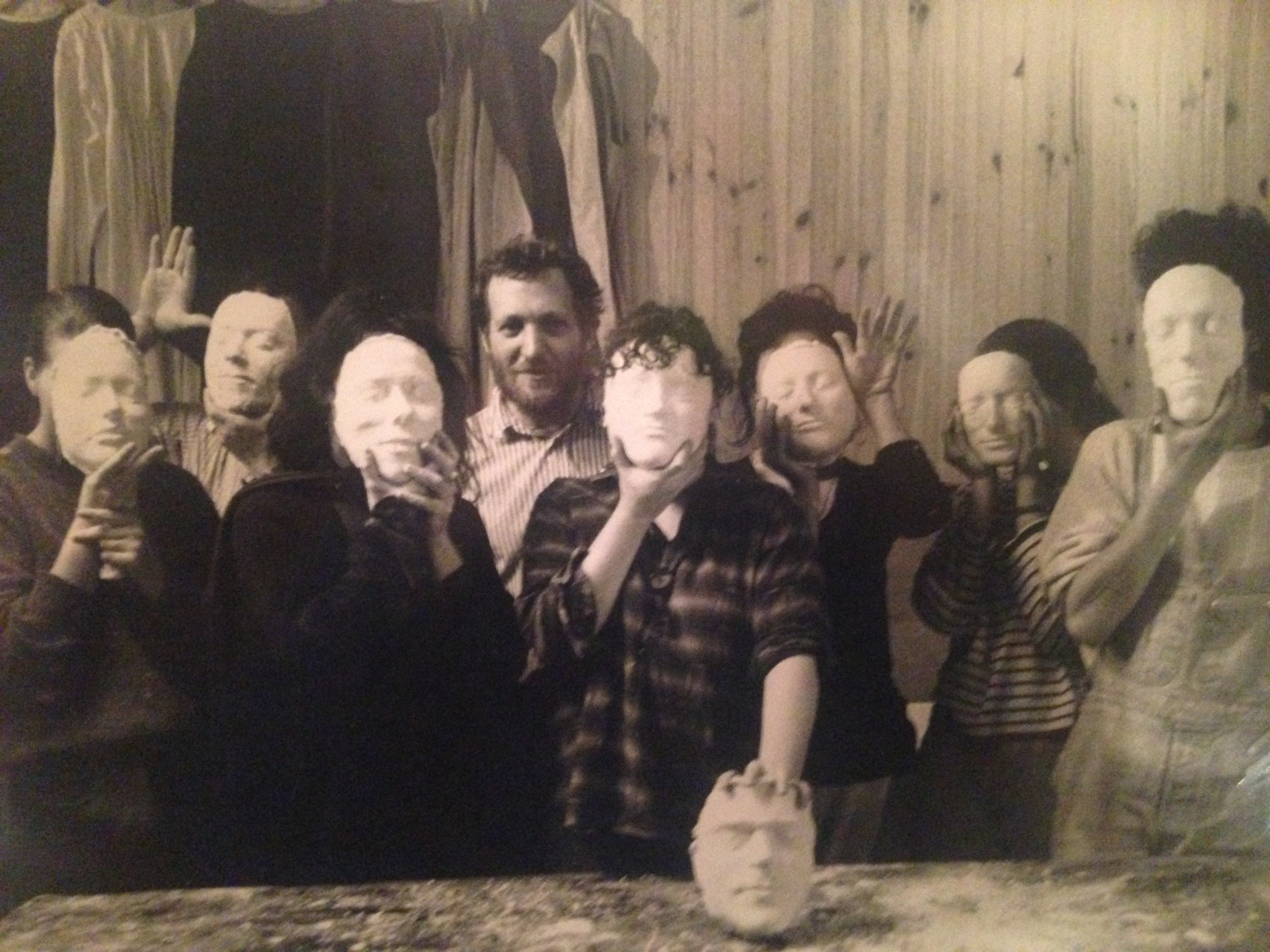 Pierangelo ( Piero ) SUMMA lors d'un atelier, années 1980